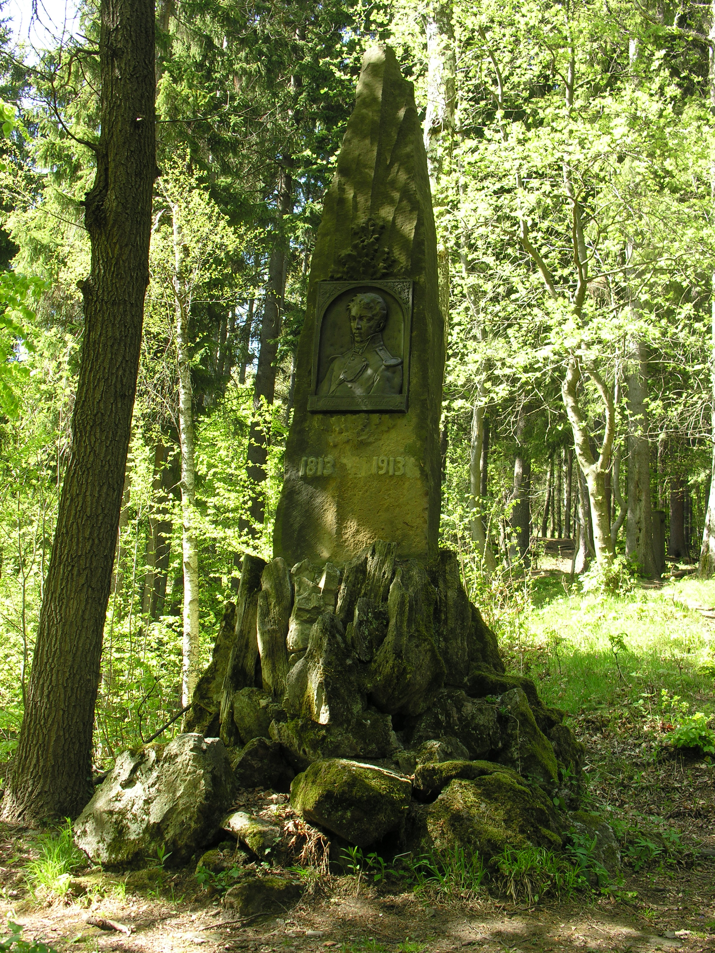 Körnerstele in Freiheit an der Aupa (Riesengebirge)